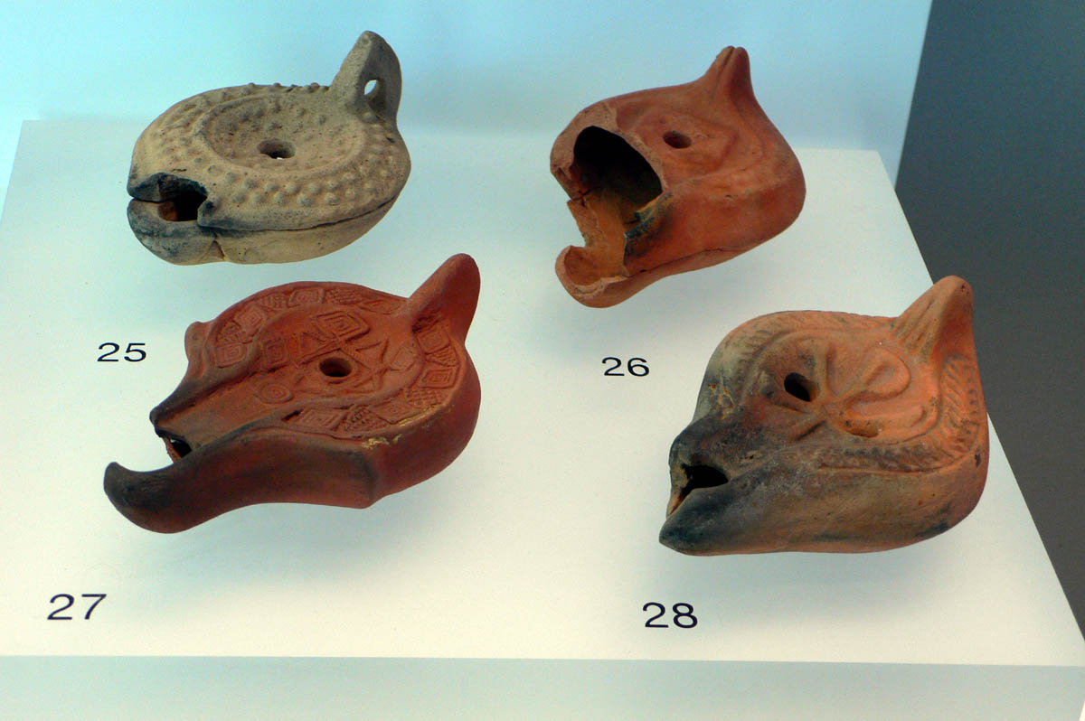 Lucernas cristianas en el Museo Nacional de Arqueología Submarina de Cartagena (España)